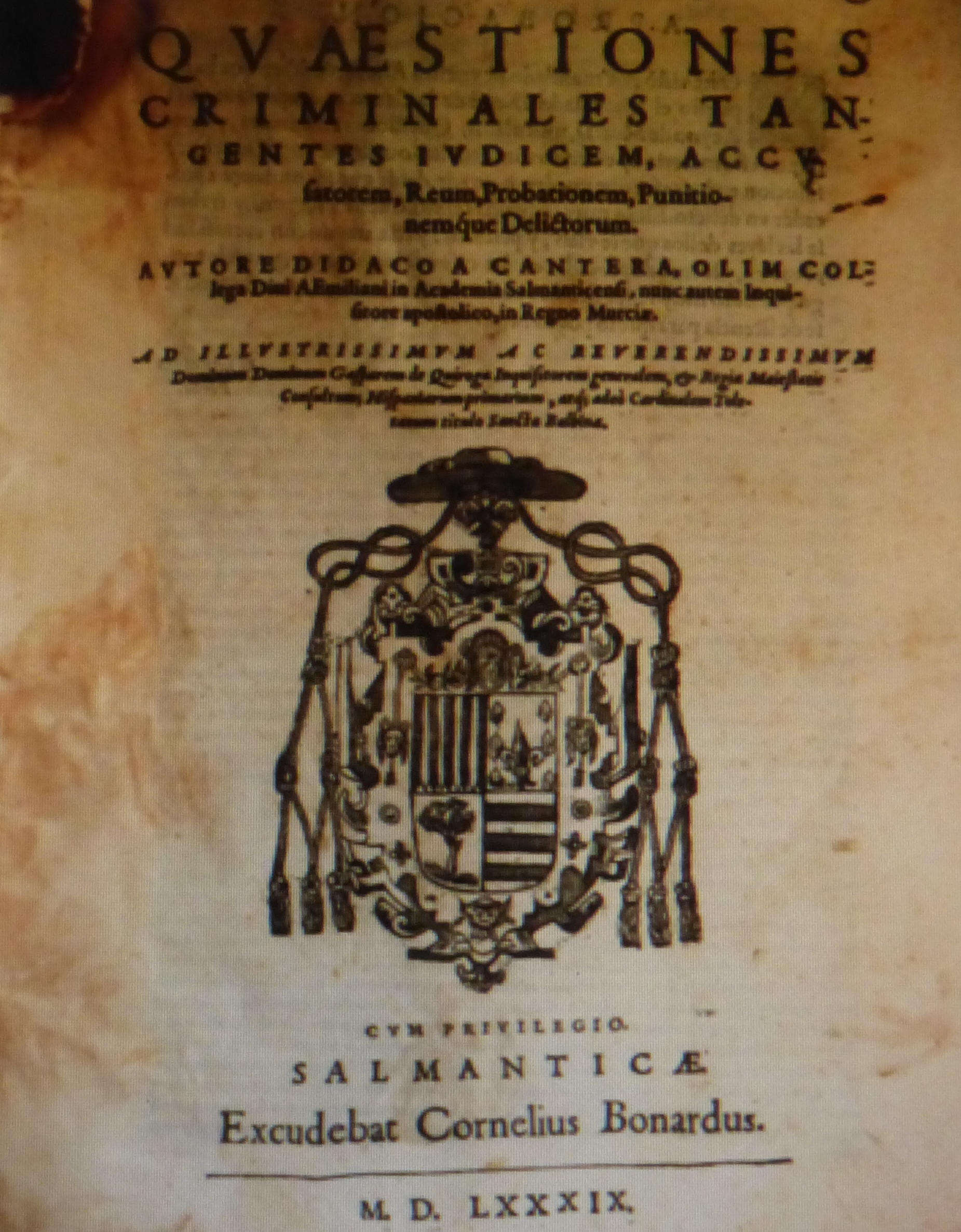 Libro de leyes del siglo XVI